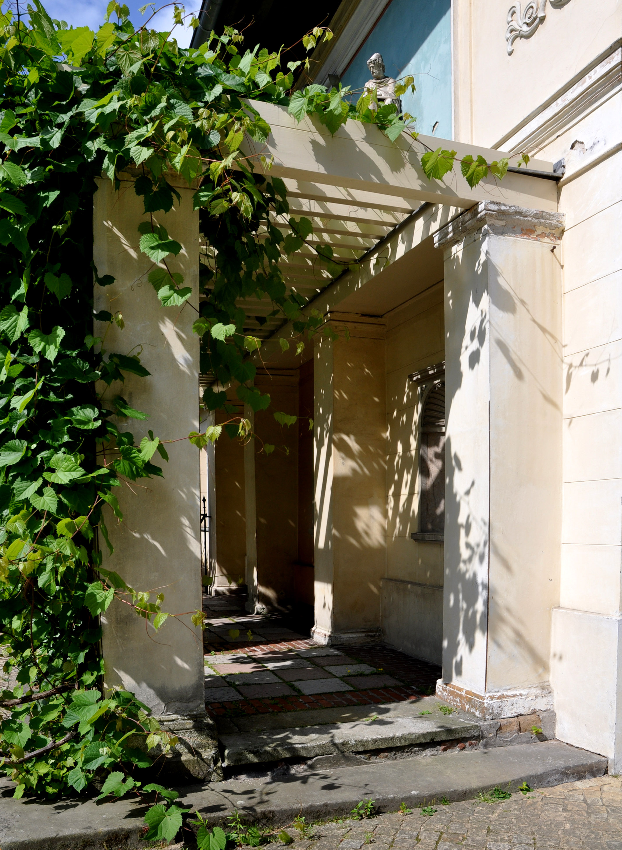 Die berankte Weinlaube